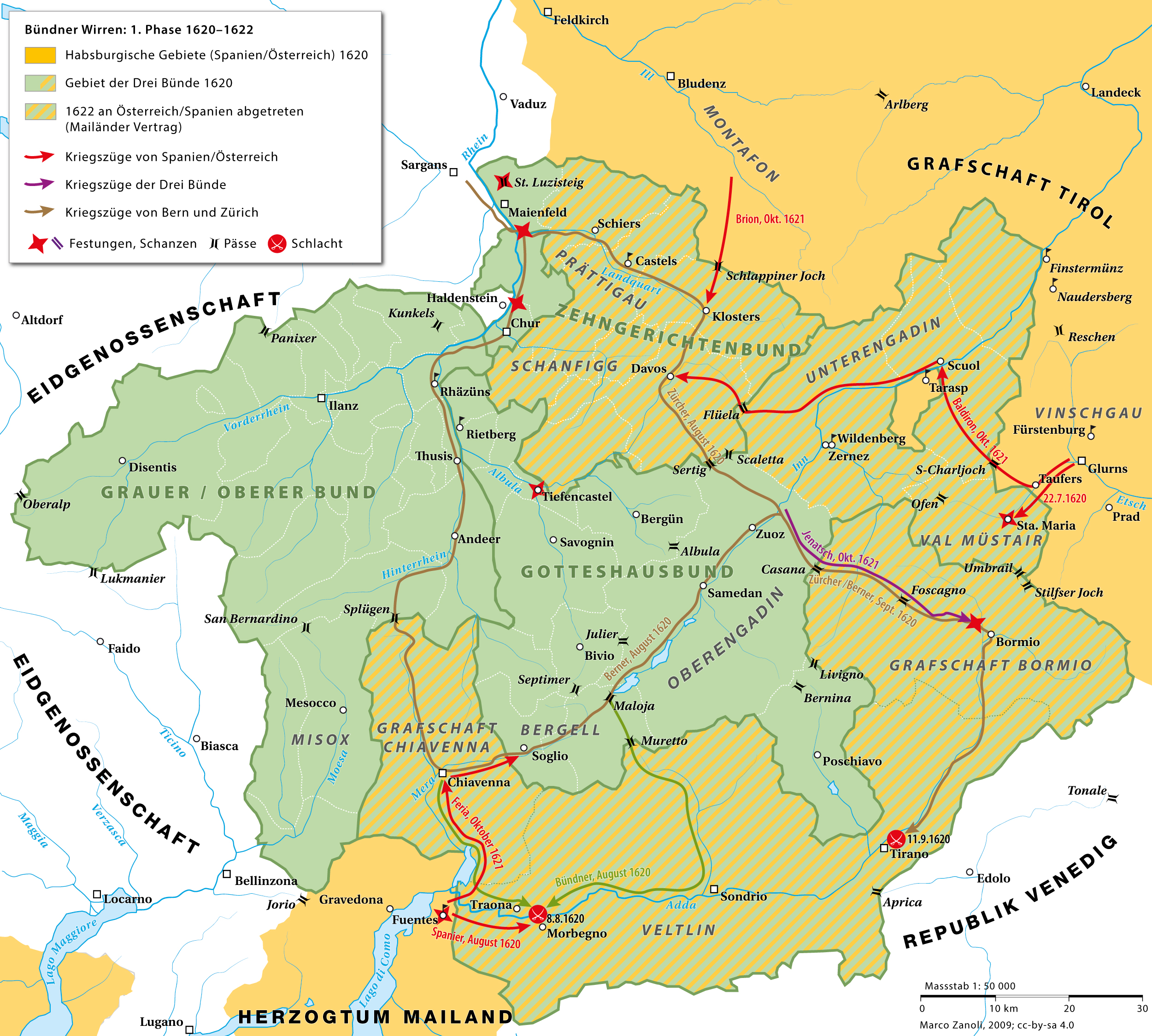 Die erste Phase der Bündner Wirren 1620–1622: Vom Veltliner Mord 1620, zur österreichisch-spanischen Invasion in die Drei Bünde bis zum Vertrag von Mailand im Januar 1622